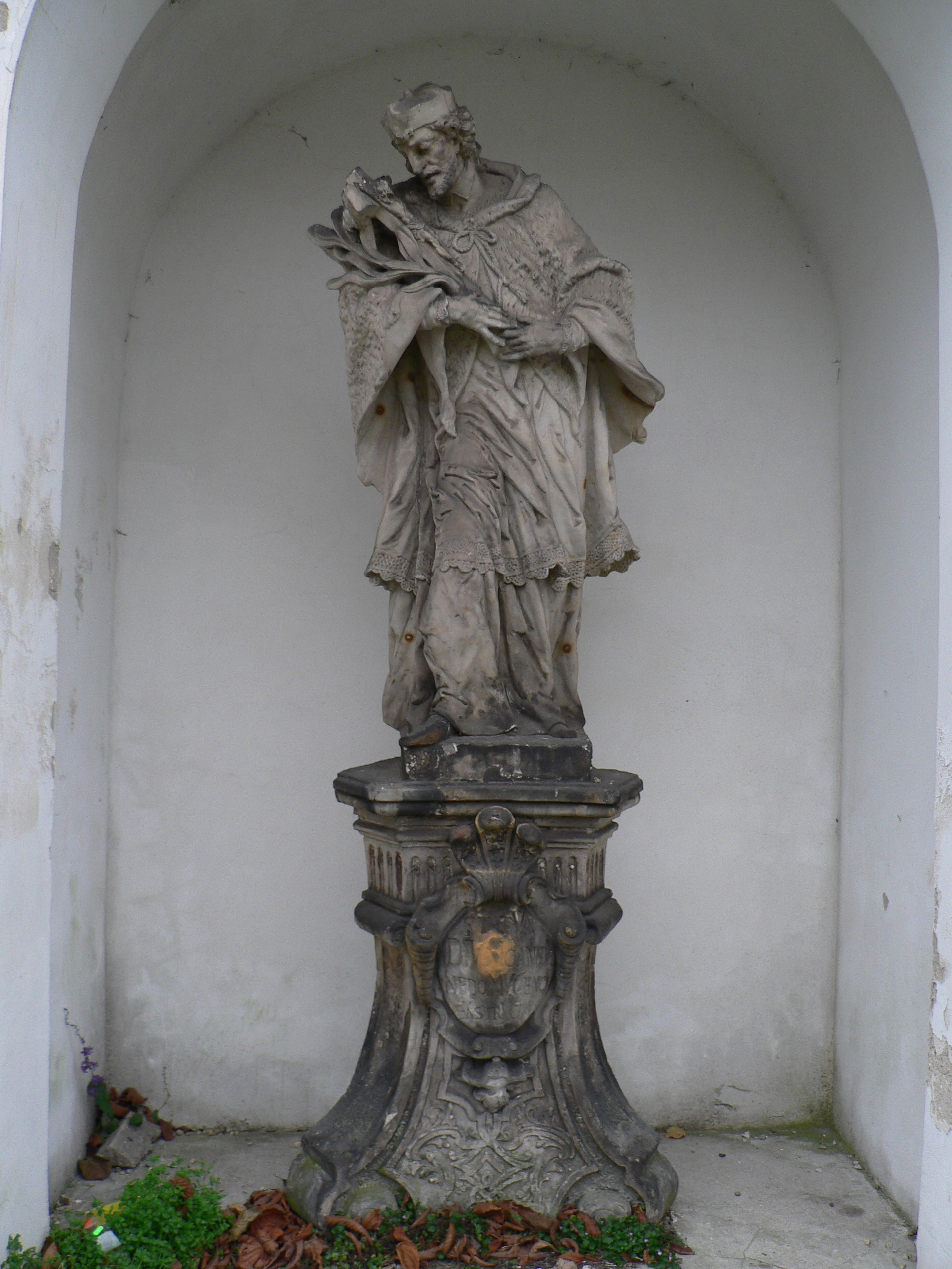 Kostel Archanděla Michaela (Branná), socha sv. Jana Nepomuckého ve východní kapli